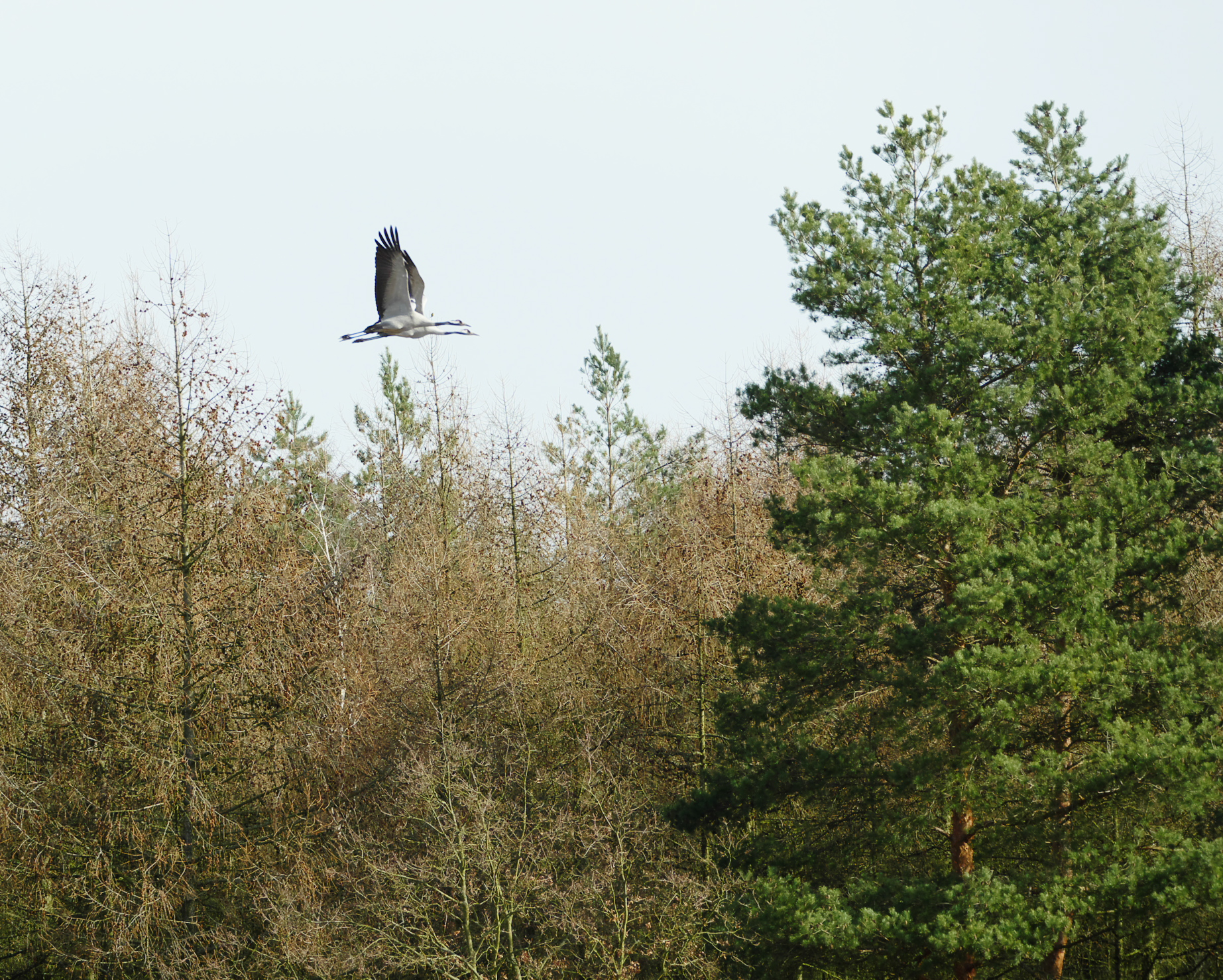 Kranichpärchen im Flug über dem Spandauer Forst